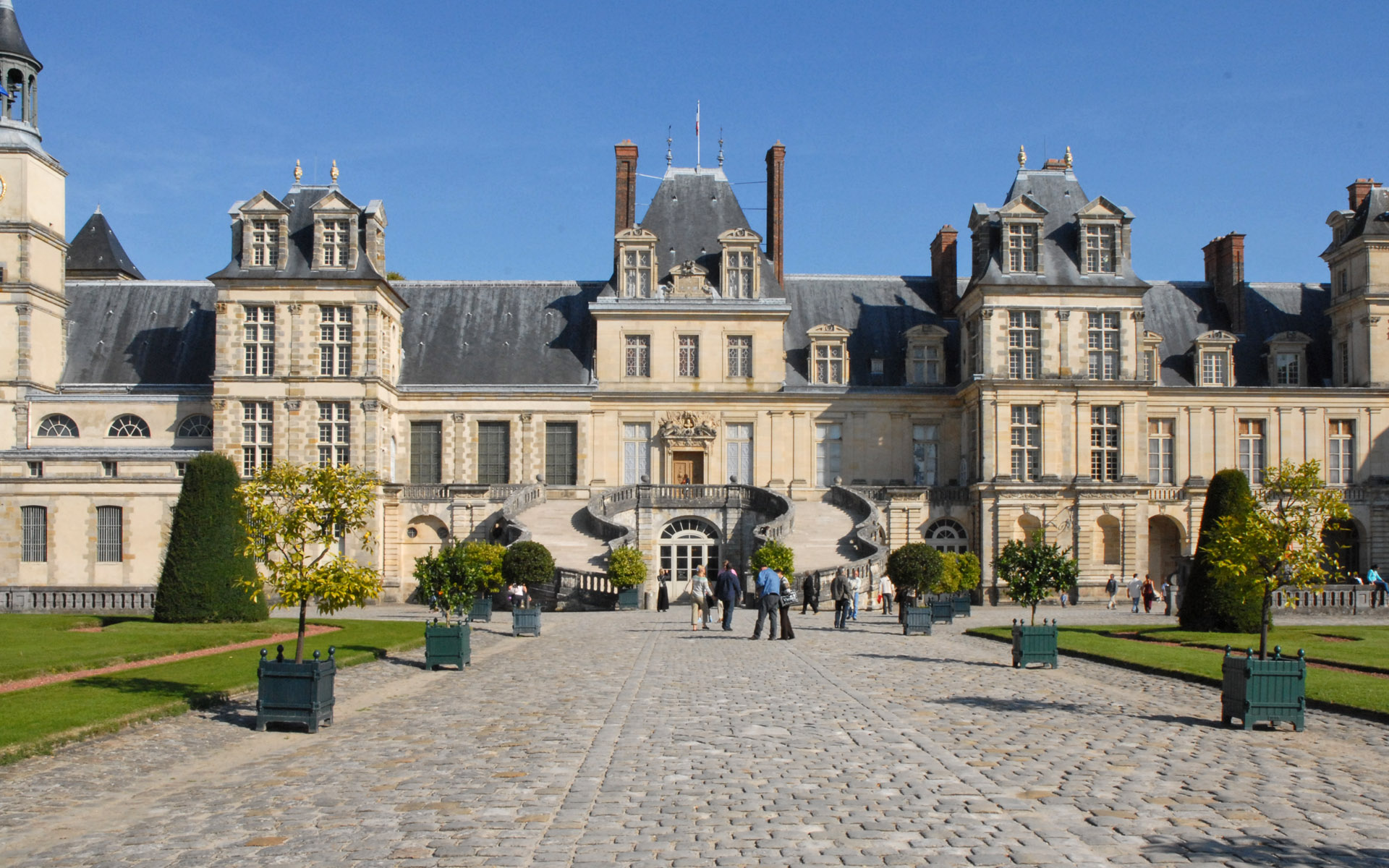 Malgré sa destination première de basse-cour, ou cour des Offices, la cour du Cheval blanc s'affirma très vite comme l'un des espaces majeurs du château. La construction, à la fin du règne de Henri II de l'escalier en fer à cheval, rebâti en 1632-1634 par Jean Androuet du Cerceau, magnifia le centre de l'aile principale ; tandis qu'un moulage en plâtre d'après la statue équestre antique de Marc-Aurèle à Rome, érigé au centre de la cour entre 1560 et 1570, lui donna le nom de cour du Cheval blanc. La cour porte aussi le nom de cour des Adieux en souvenir de la cérémonie du départ de Napoléon pour l'île d'Elbe qui se déroula au pied de l'escalier, le 20 avril 1814. Le château de Fontainebleau offre le souvenir de plus de 700 ans de présence des souverains de France, de l’intronisation de Louis VII en 1137 à la chute du Second Empire en 1870.